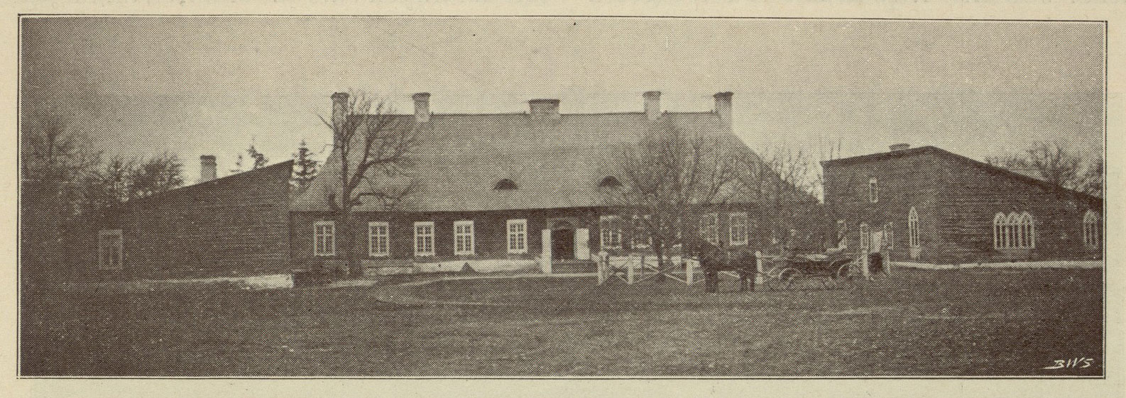 Беларуская (тарашкевіца): Сядзіба Ельскіх (Jelski) у Дудзічах (Dudzičy)